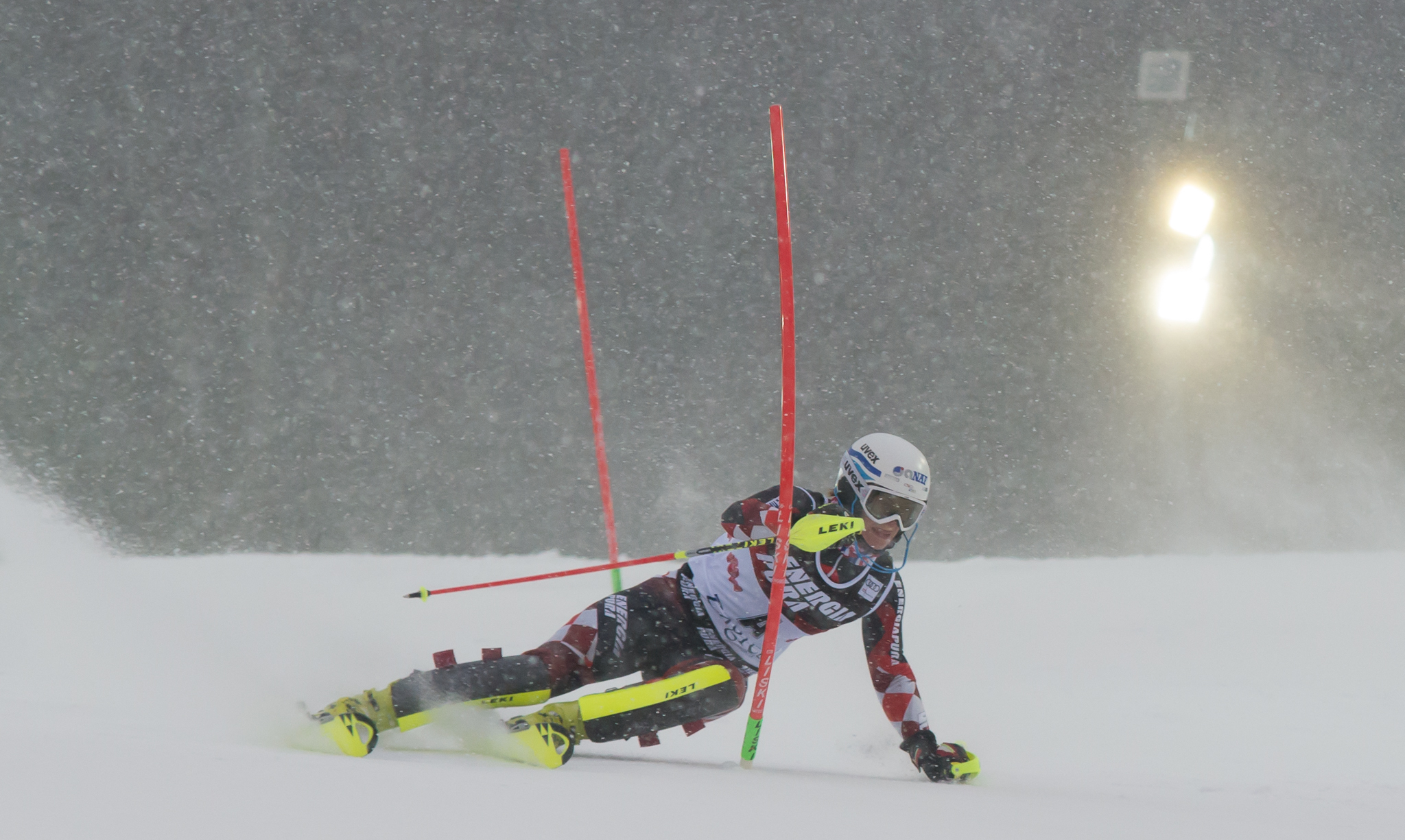 Leona Popović